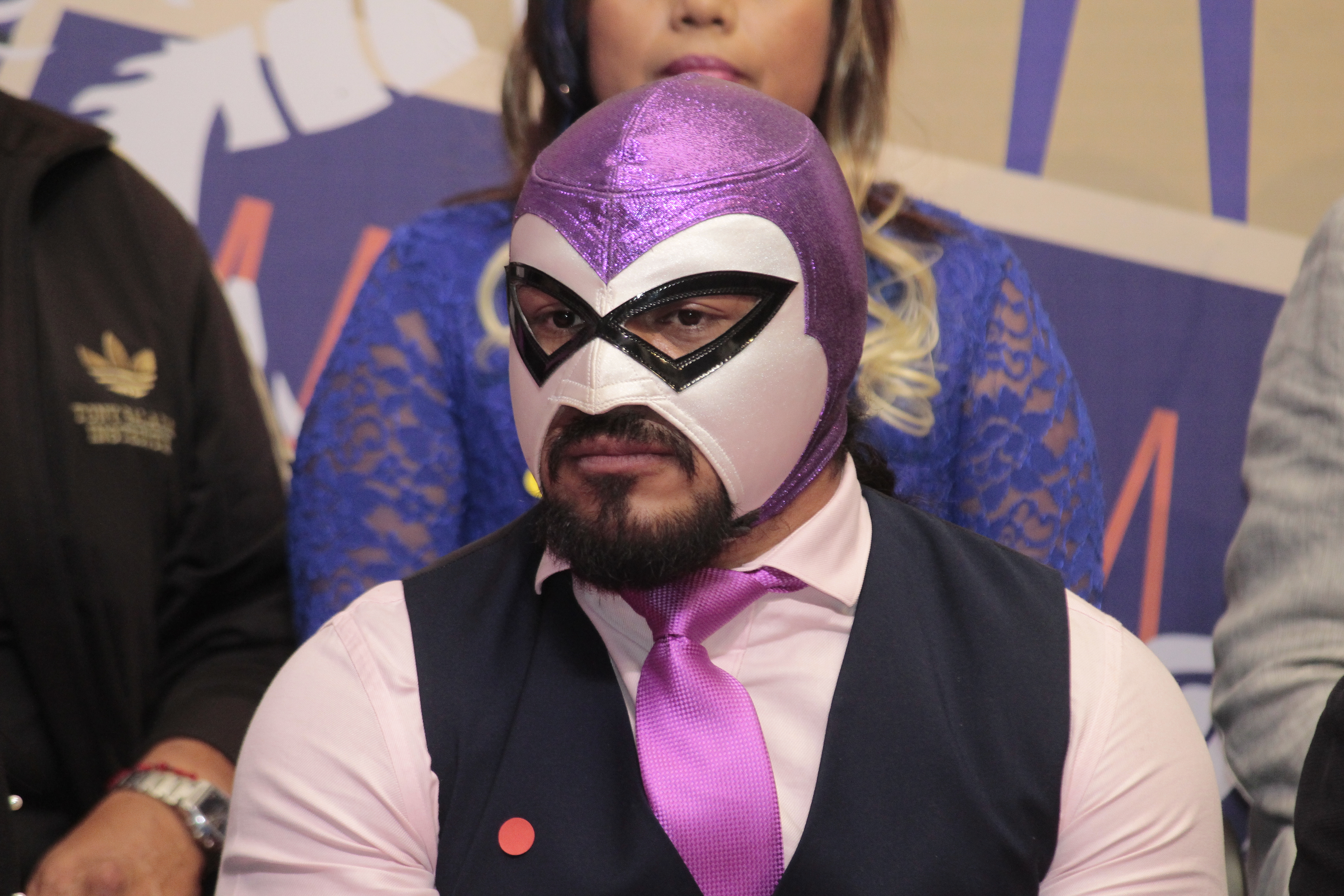 Le catcheur El Hijo del Fantasma lors de la cérémonie d'entrée de la Lucha libre dans le patrimoine immatériel de la ville de Mexico